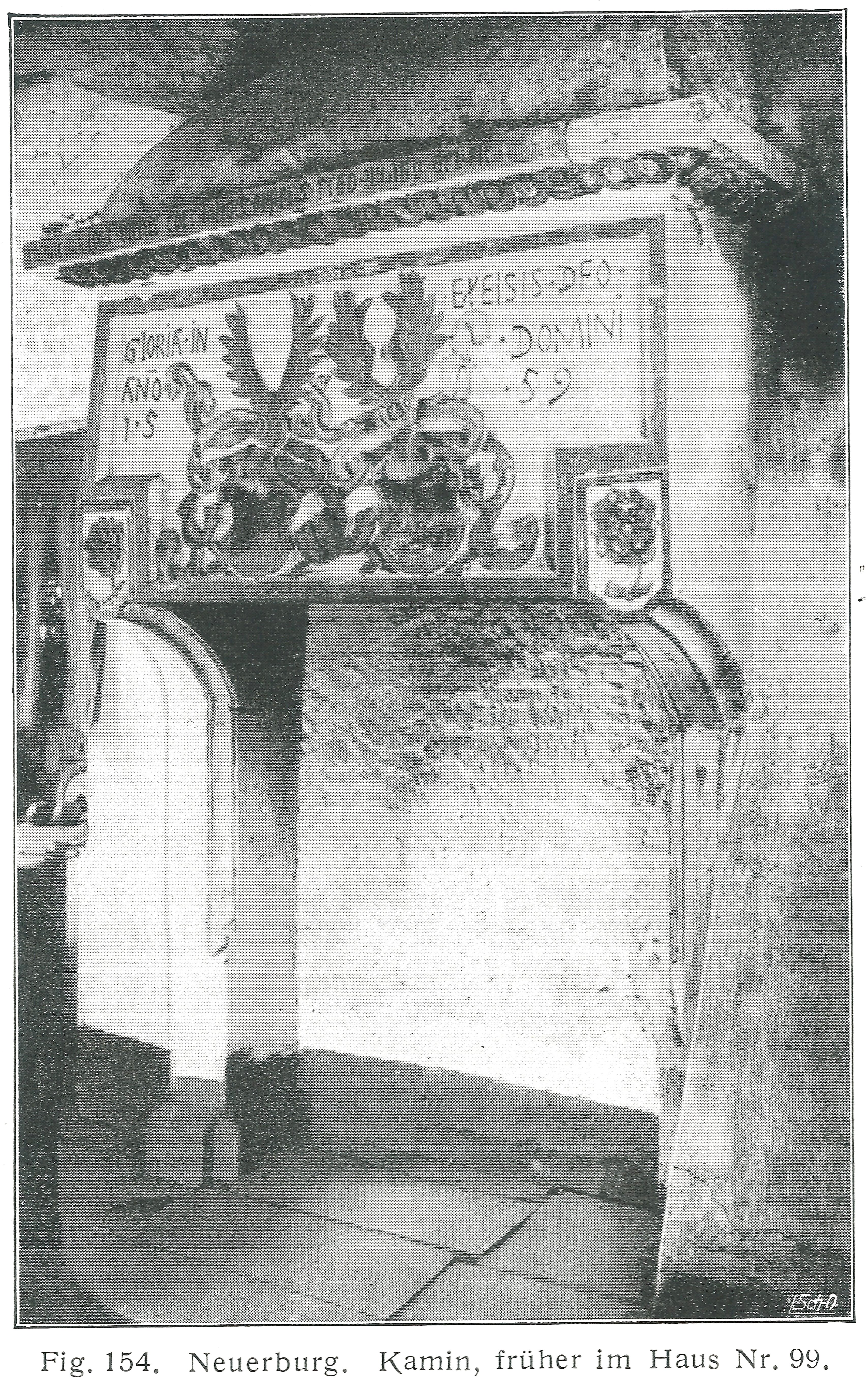 54675 Körperich, Schloss Kewenig 1. Schloss Kewenig zählt zu den ältesten Gutshäusem im Landkreis Bitburg-Prüm. Das Schloss wurde 793 durch Gerswindis dem Kloster Lorsch geschenkt und 1231 urkundlich als Villa de Cheweningen erwähnt. Einst Sitz der Herrn von Stein. Der Kern ist eine Wasserburg von quadratischem Grundriss mit Ecktürmen und Rundbogenfries des 16. Jahrhunderts (war 1816 verfallen und 1890-91 erweitert worden. Instandsetzung 1970-71). Scan von 2018.